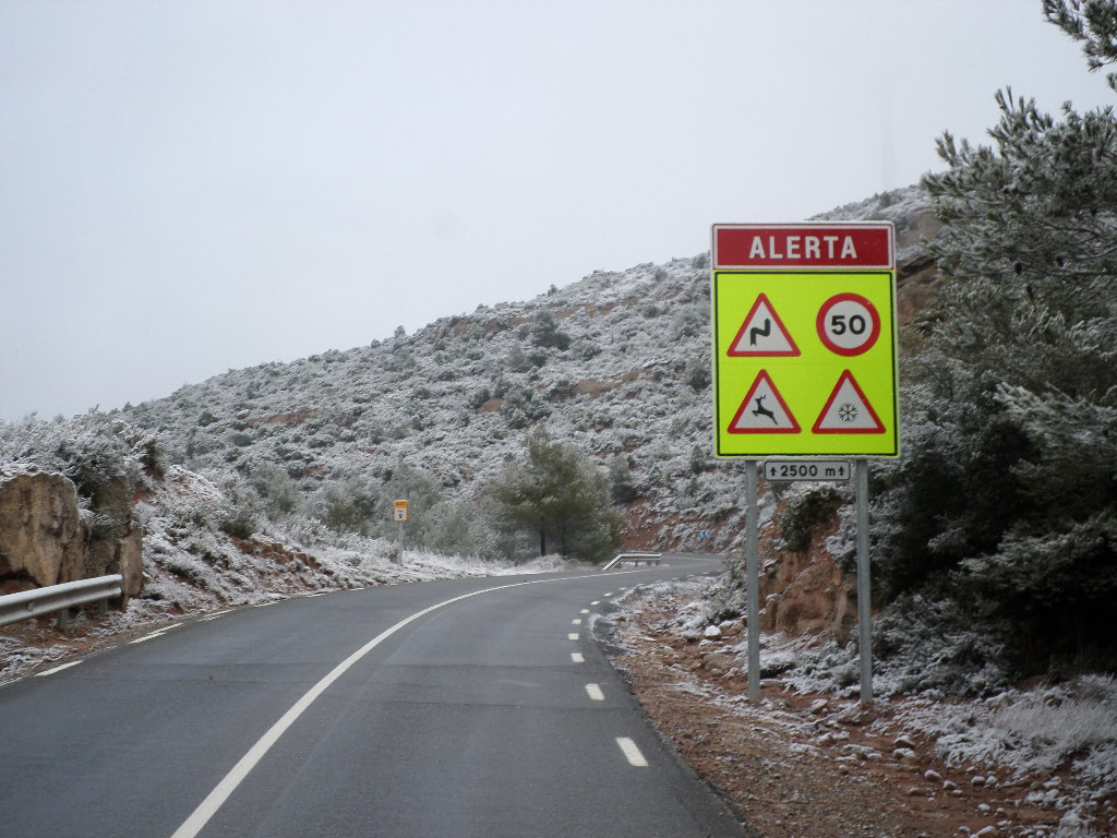 La carretera de les Maioles (BV-1031), el dia 20 de gener de 2015.